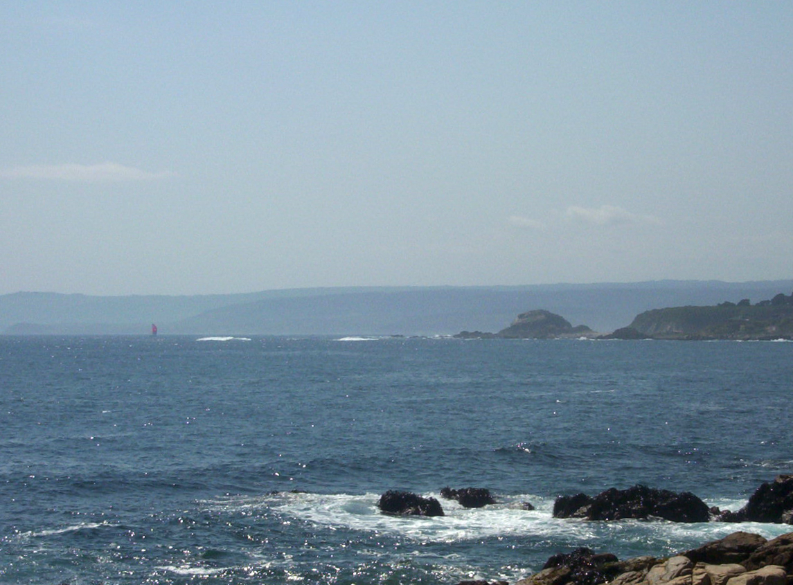 El sector de El Quisco Norte y la Peña Blanca de El Canelo, vistos desde la Península de El Quisco. Provincia de San Antonio, V Región de Valparaíso, Chile.